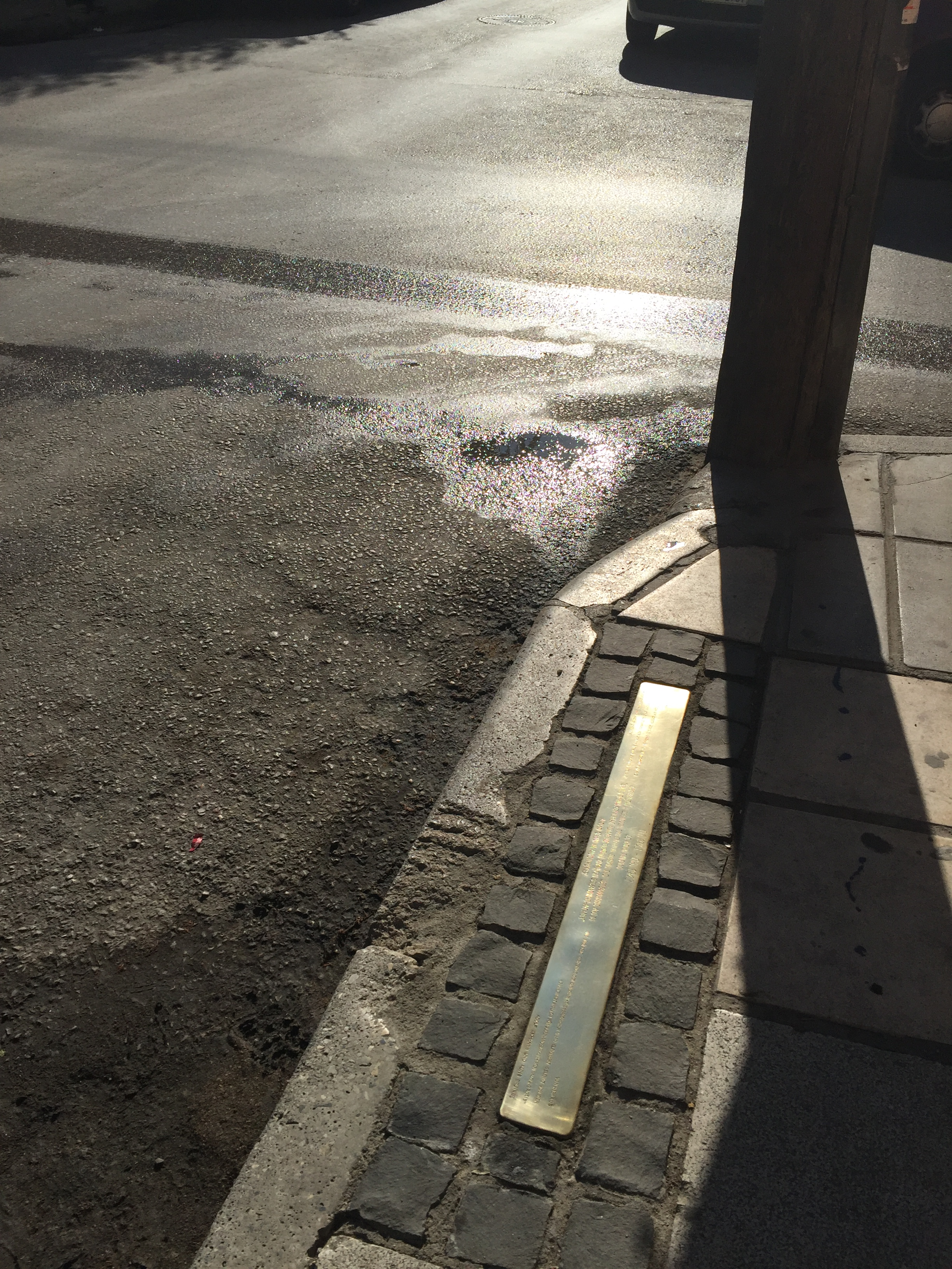 Stolperschwelle in Thessaloniki